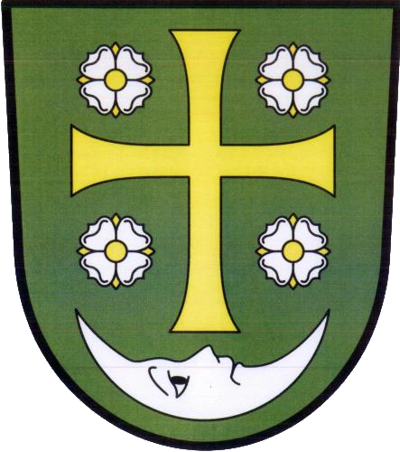 Sviny, znak obce